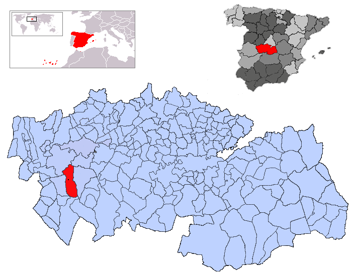 Belvís de la Jara en la provincia de Toledo